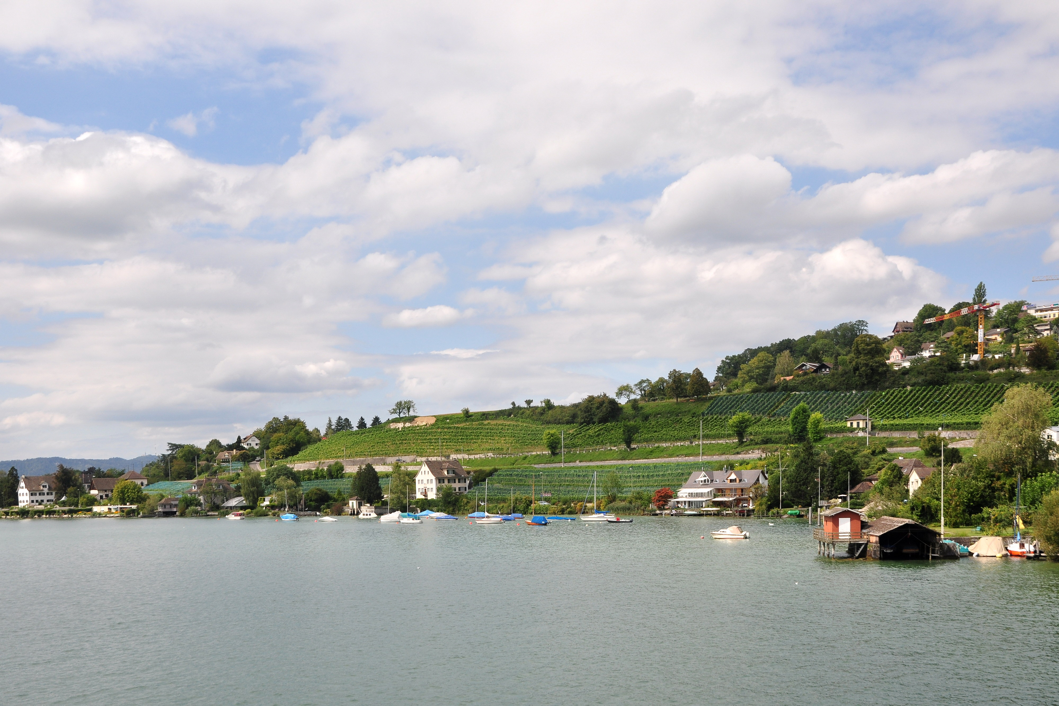 Rohrenhab, Uferzone, neolithische und frühbronzezeitliche Seeufersiedlungen in Meilen (Switzerland)